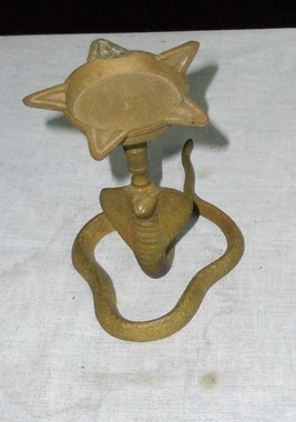 നാഗപ്പത്തി വിളക്ക്